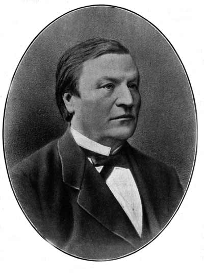 Johan Gustaf Malmsjö (1815-1891)